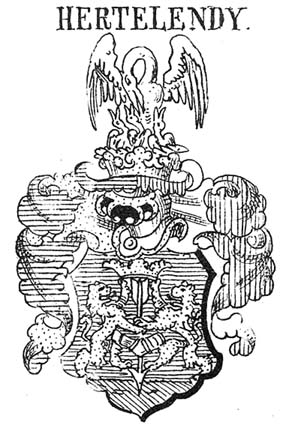 Blason de la famille hongroise Hertelendy de Hertelend et Vindornyalak (en hongrois : hertelendi és vindornyalaki Hertelendy)